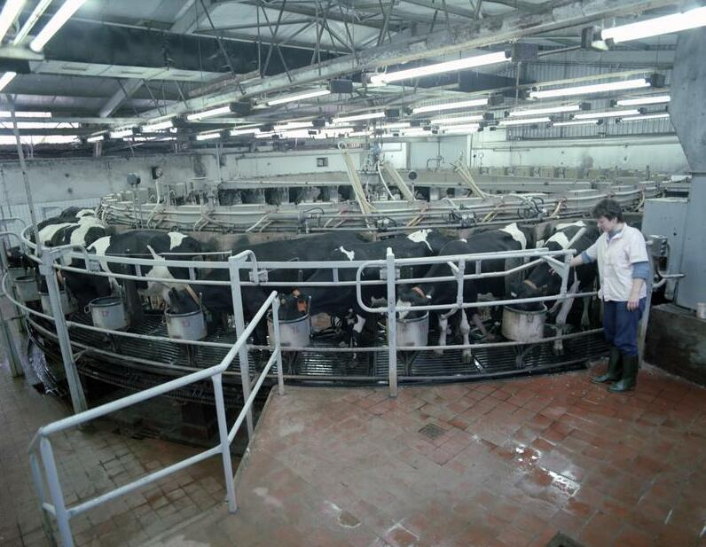 ADN-ZB/Link/22.8.1985 Bez. Neubrandenburg: Dorfporträt Dedelow Die moderne Milchviehanlage der LPG Milchproduktion Dedelow. Futterzusammensetzung und Transport werden über ein Steuerpult geregelt. In einem Melkkarussell werden pro Stunde 200 Tiere gemolken. Diese Arbeit kontrolliert die Melkerin Sabine Hausmann.